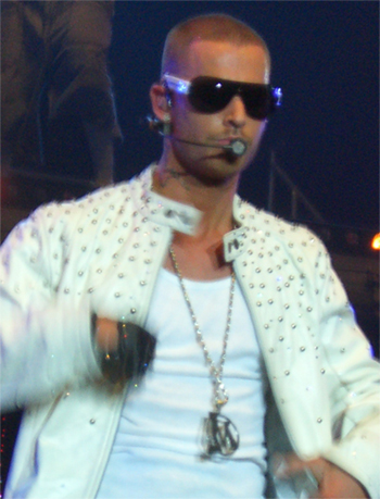 M. Pokora sur la scène de Bercy à Paris à l'occasion de sa tournée Player Tour début 2007.